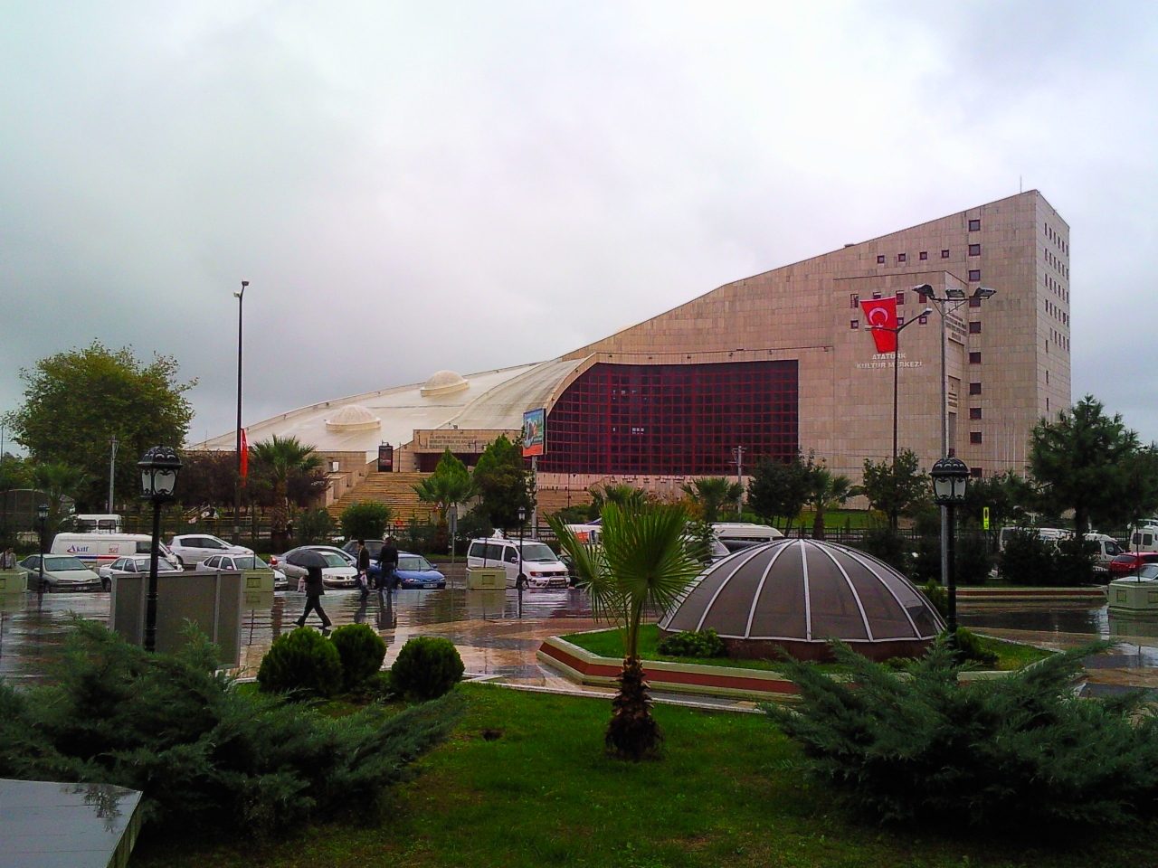 Samsun Atatürk Kültür Merkezi'nin Samsun Kalesi sur dibinden çekilen resmi.